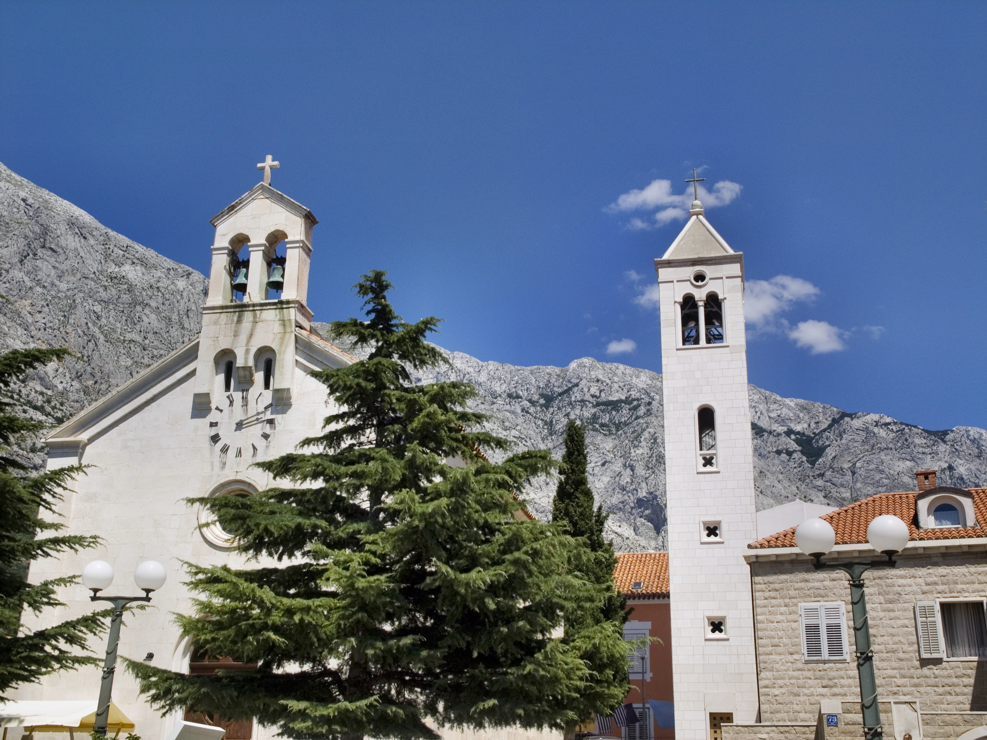 Хорватия, Башка Вода, Церковь Святого Николая